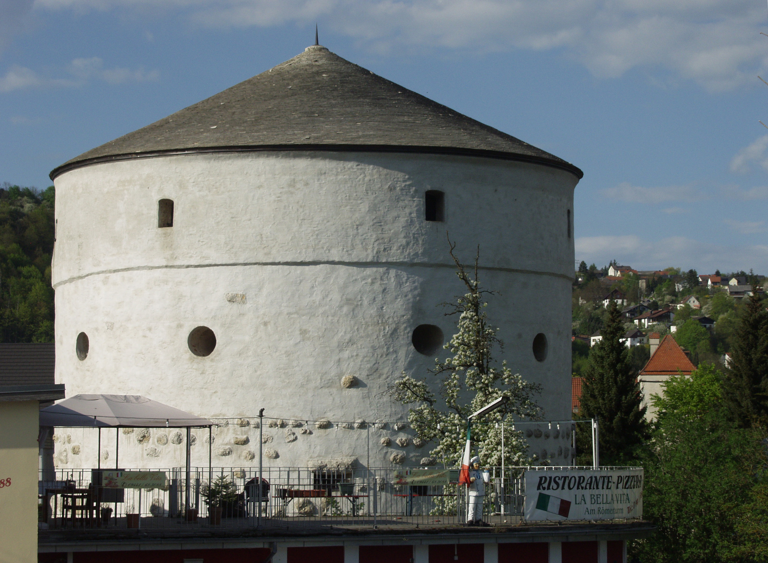 Schleiferturm (1474–1486) in Kelheim, fälschlicherweise genannt Römerturm